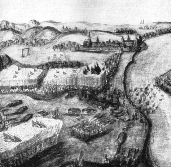 Federzeichnung der Schlacht bei Drakenburg 1547, gezeichnet ca. 1570